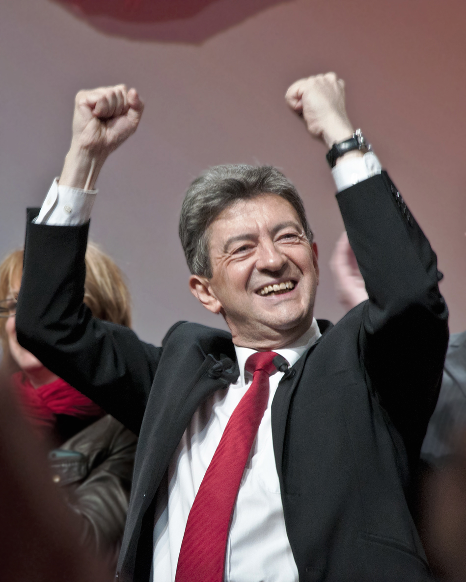 Dernier grand meeting de campagne du Front de Gauche et de son candidat Jean-Luc Mélenchon avant le premier tour des élections présidentielles. 19 avril 2012.